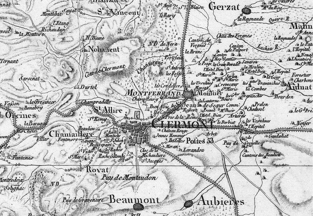 Carte de Cassini : extrait montrant la région de Clermont-Ferrand Libre de droits (carte publiée au XVIIIe siècle)